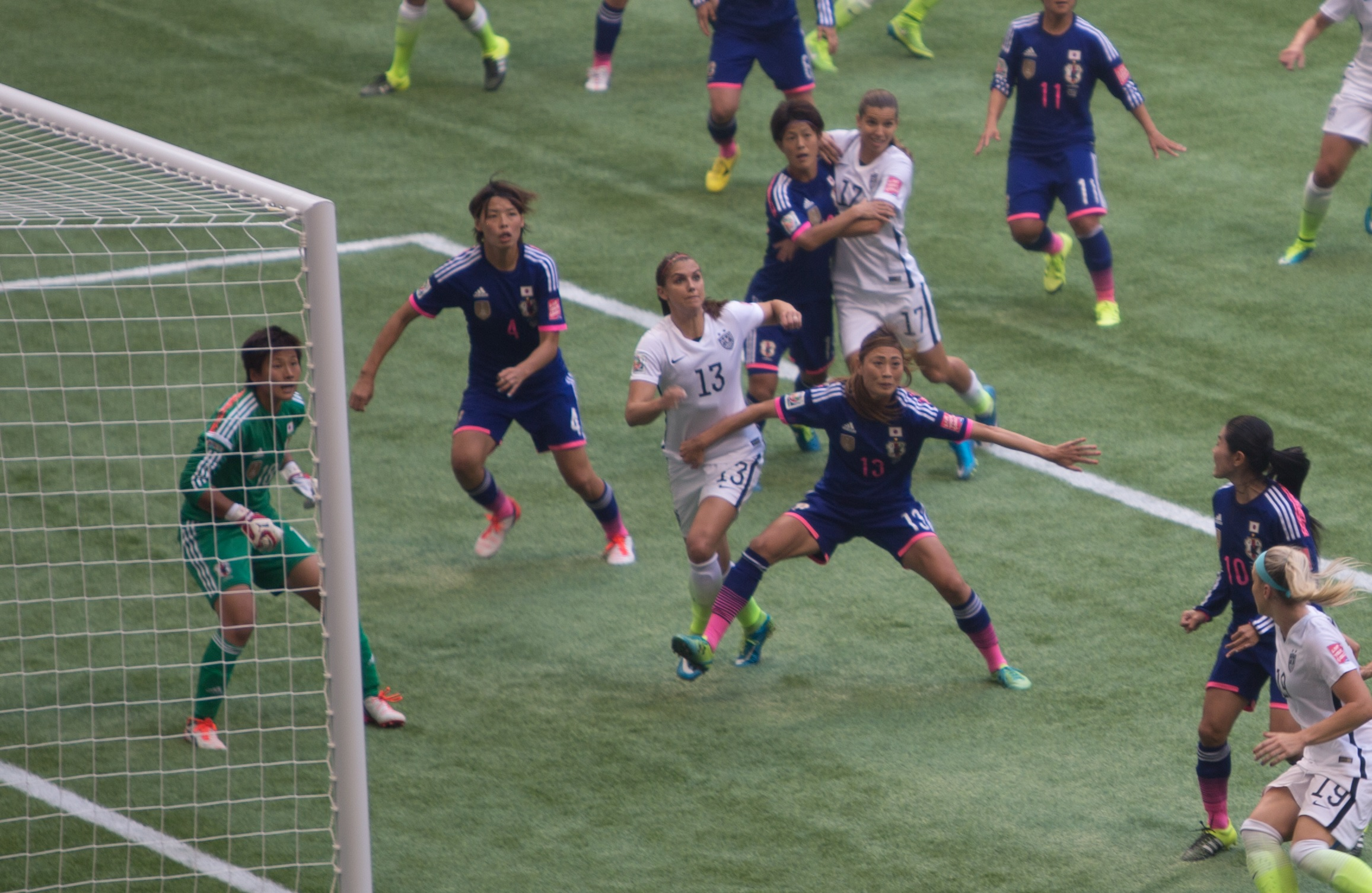 Finale de la Coupe du monde 2015 opposant le Japon aux États-Unis, le 5 juillet au BC Place Stadium de Vancouver.